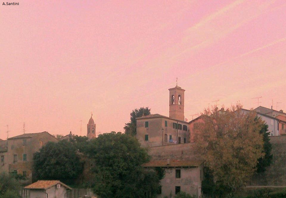 Panorama del centro storico di Piagge